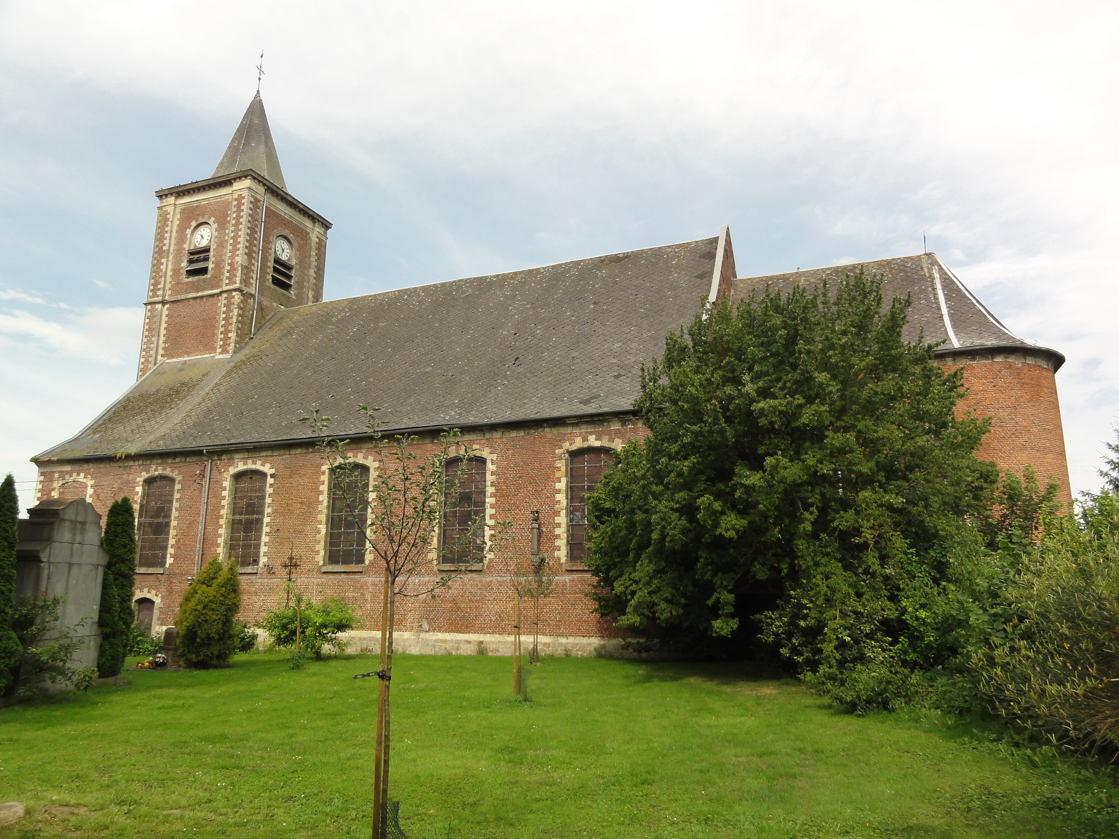 Villers-Pol (Nord, Fr) Église Saint-Martin, vue latérale